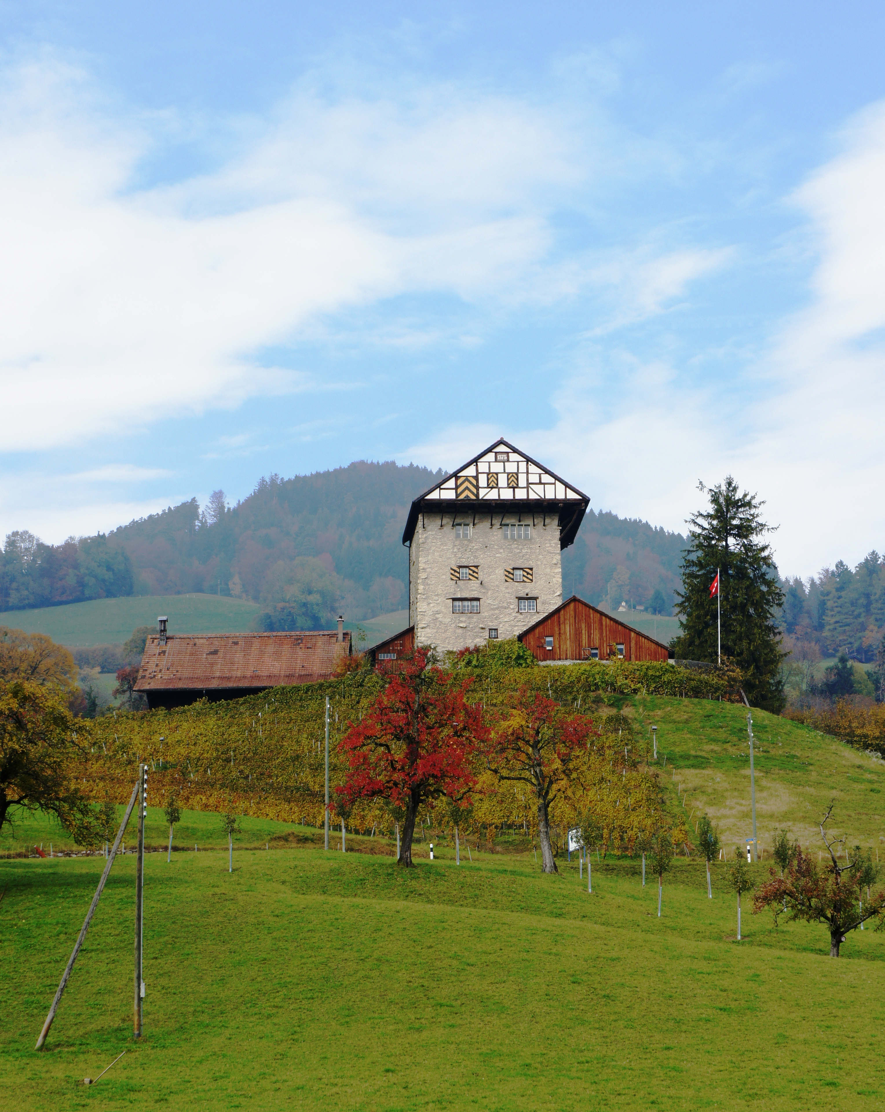 Blick aus Süden zur Burg Neu-Altstätten in Lüchingen.